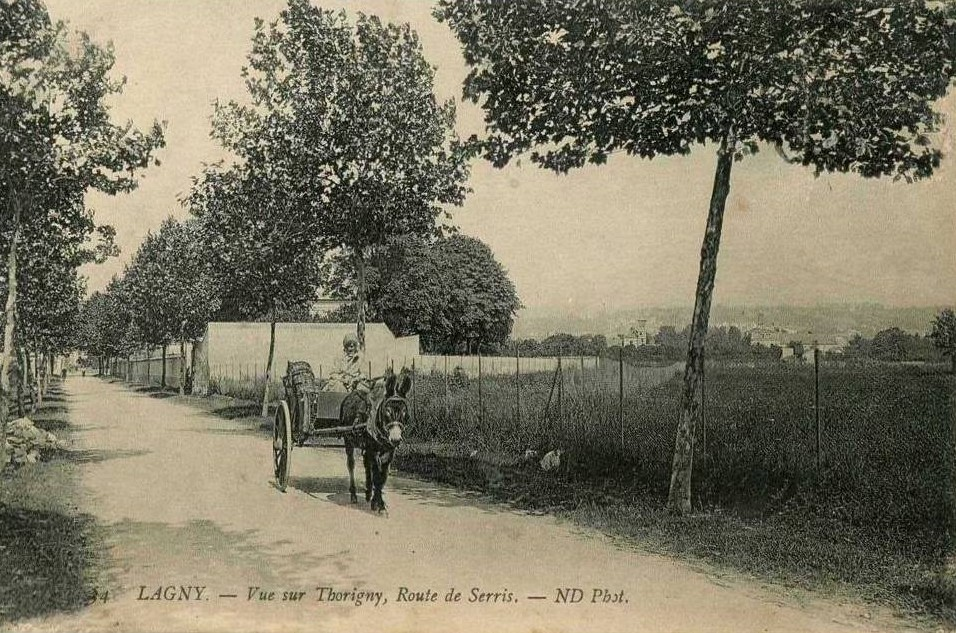 Carte postale ancienne - Rue de Lagny-sur-Marne